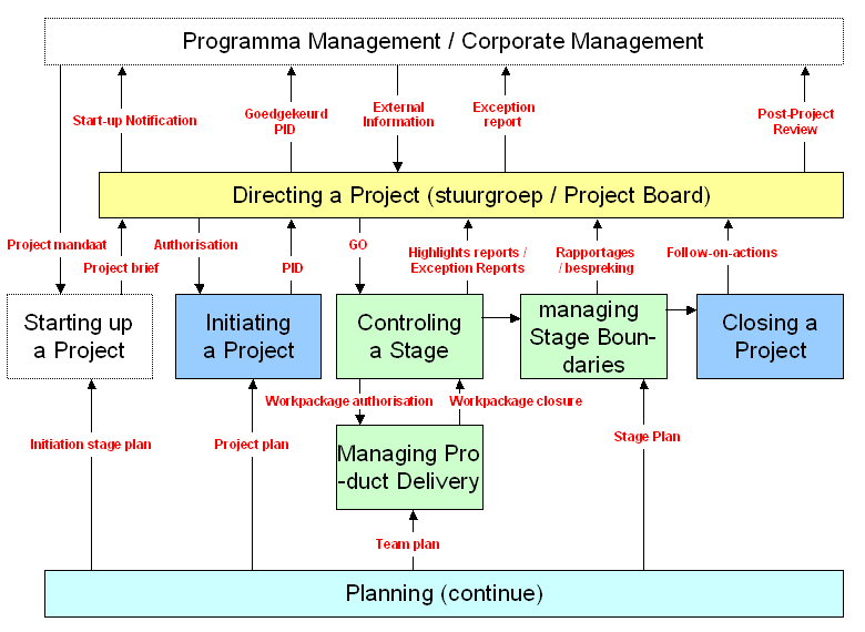 Zelfgemaakte media. Het Procesmodel beschrijft de stages (vierkante gekleurde vlakken) en de controls (in rood). Via de zwarte pijlen wordt duidelijk in welke richting het model dient te worden doorgelopen, voordat verder gegaan kan worden. Merk op dat de Project Board (Directing a Project) hierin een centrale rol heeft. De Projectleider / Project Manager heeft 'slechts' de verantwoordelijkheid om het hele proces draaiende te houden en geeft adviezen. De Project Board is verantwoordelijk voor beslissingen en bijsturing.